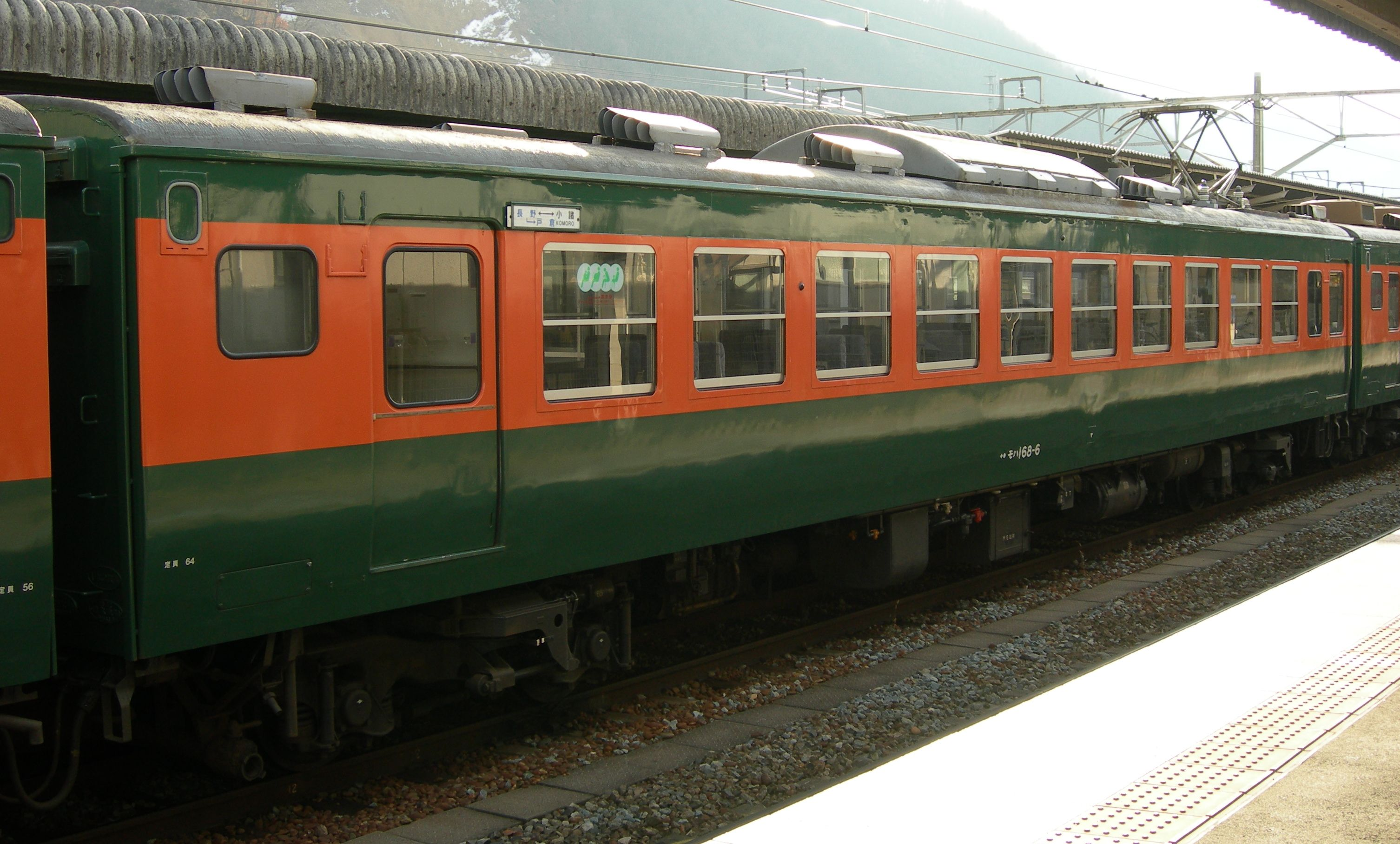 モハ168-6